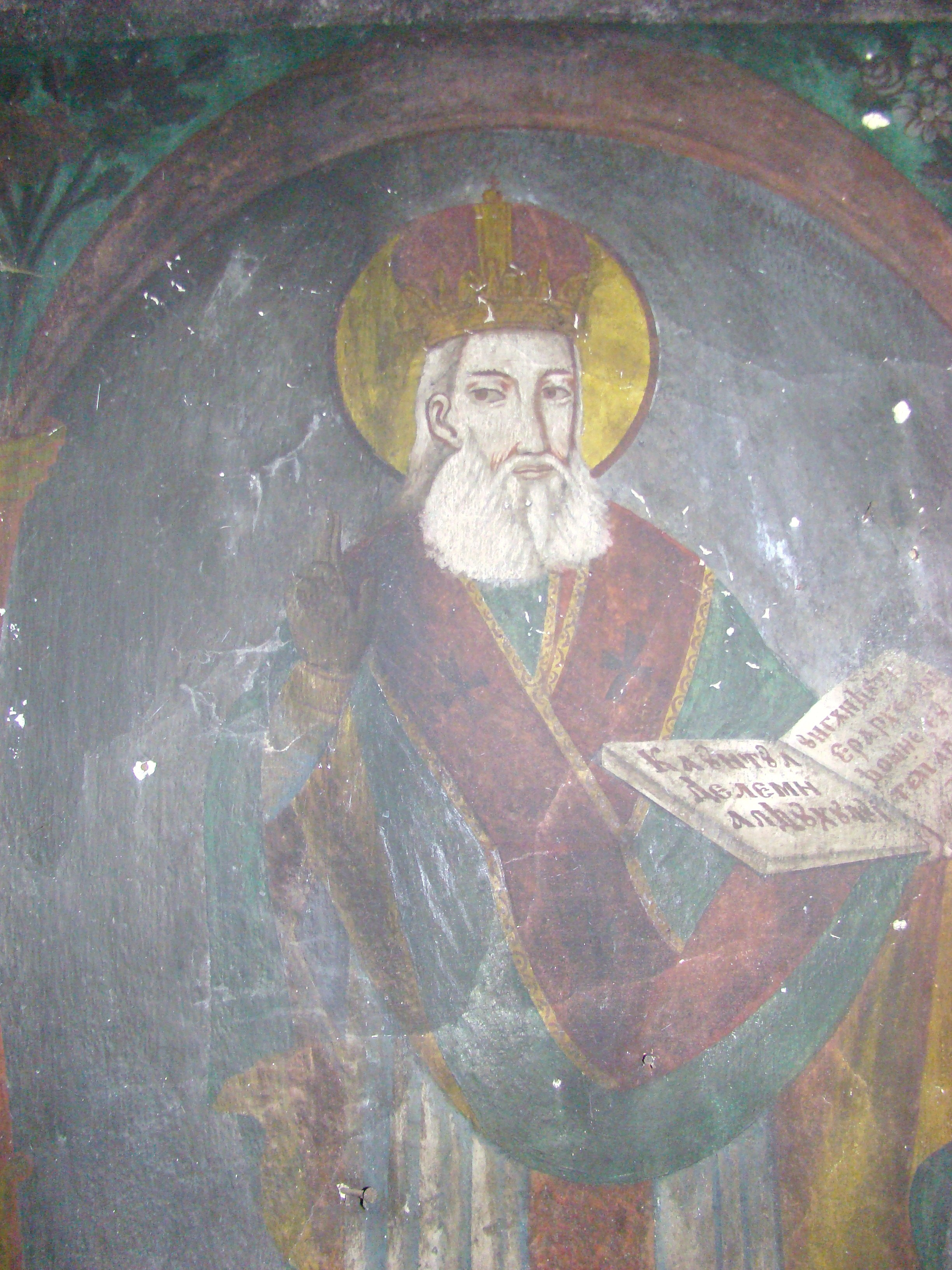 Biserica de lemn "Sfântul Nicolae", sat VALEA CHIOARULUI